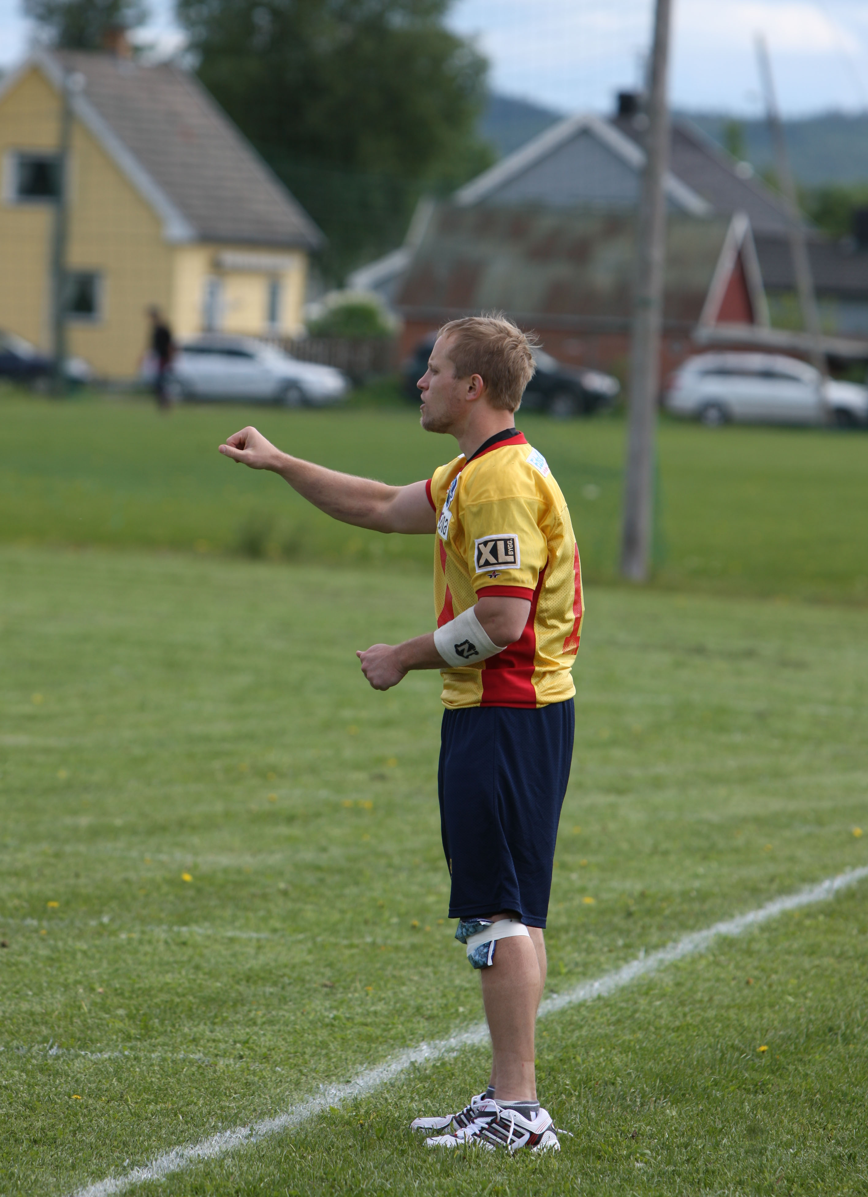 William Miller, Eidsvoll 1814s